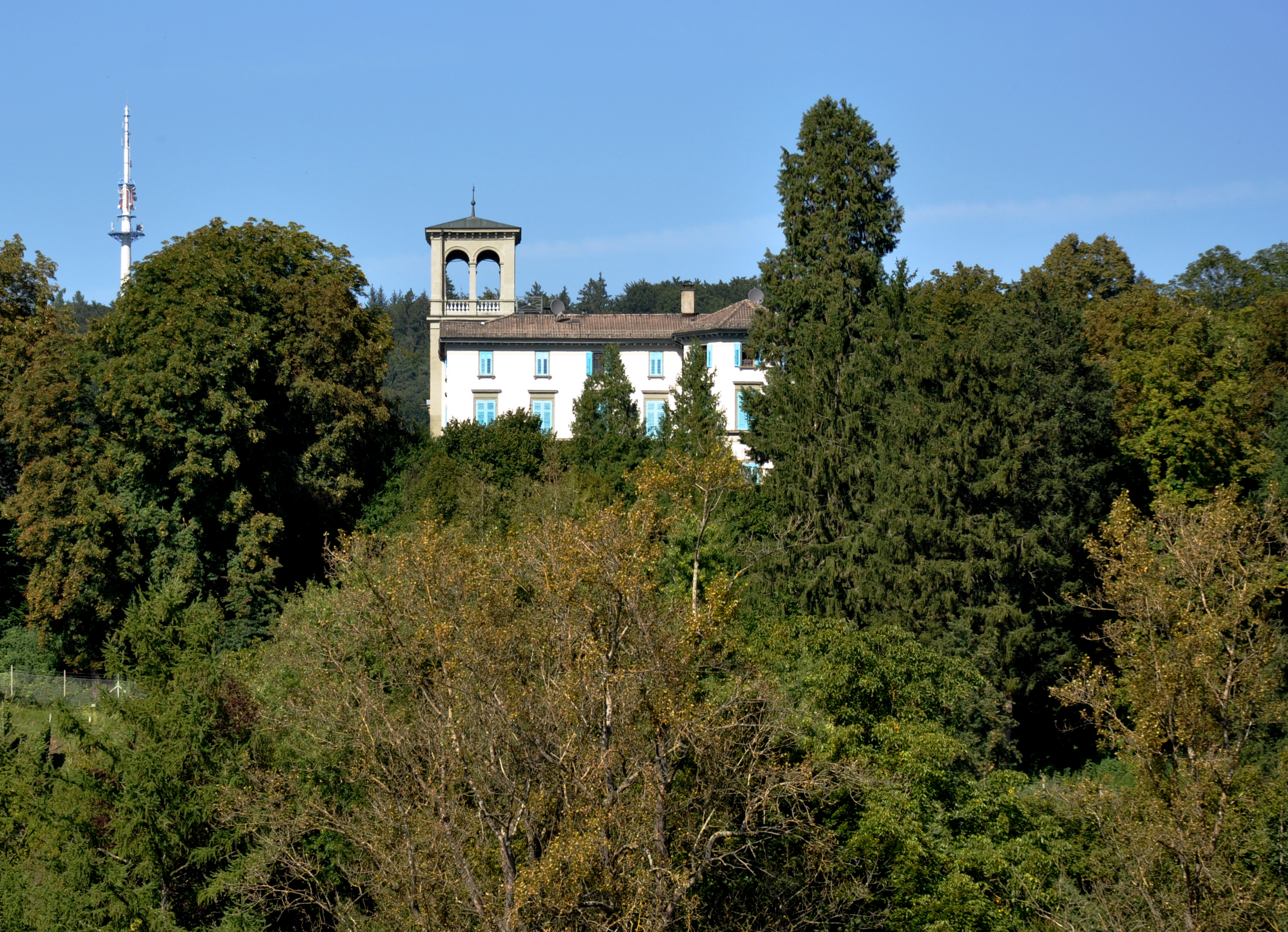 Kloster Sankt Katharinental (Diessenhofen) Blick über den Rhein zur Villa Rheinburg in Gailingen